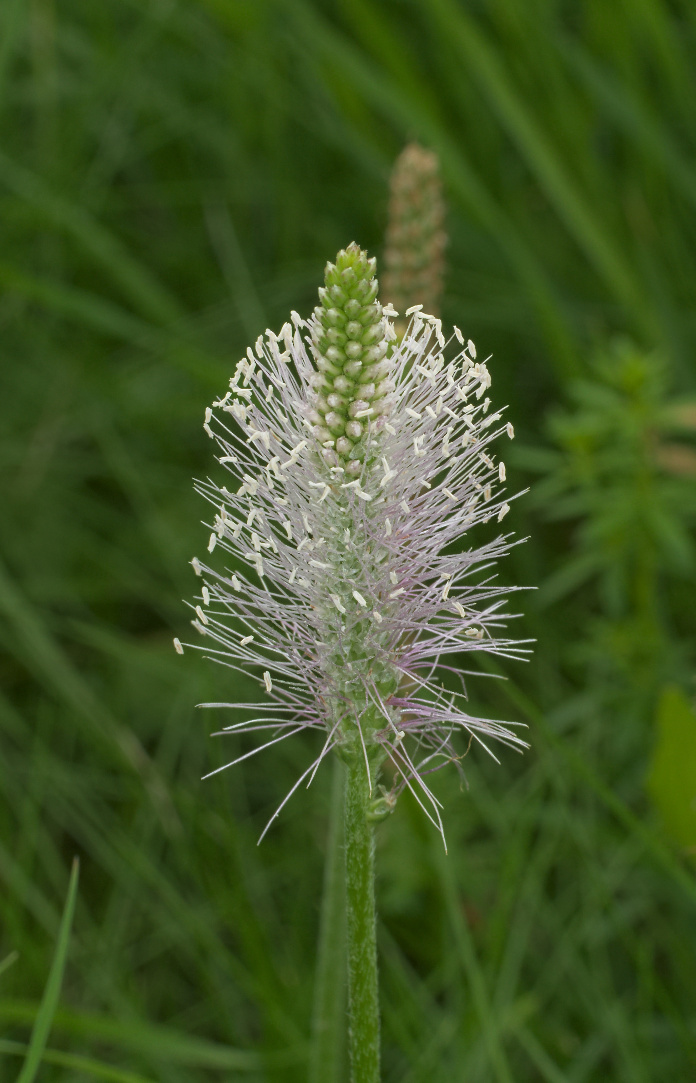 Mittlerer Wegerich - Plantago media. Aufgenommen am Neckar in Mannheim-Feudenheim, Baden-Württemberg, Deutschland.